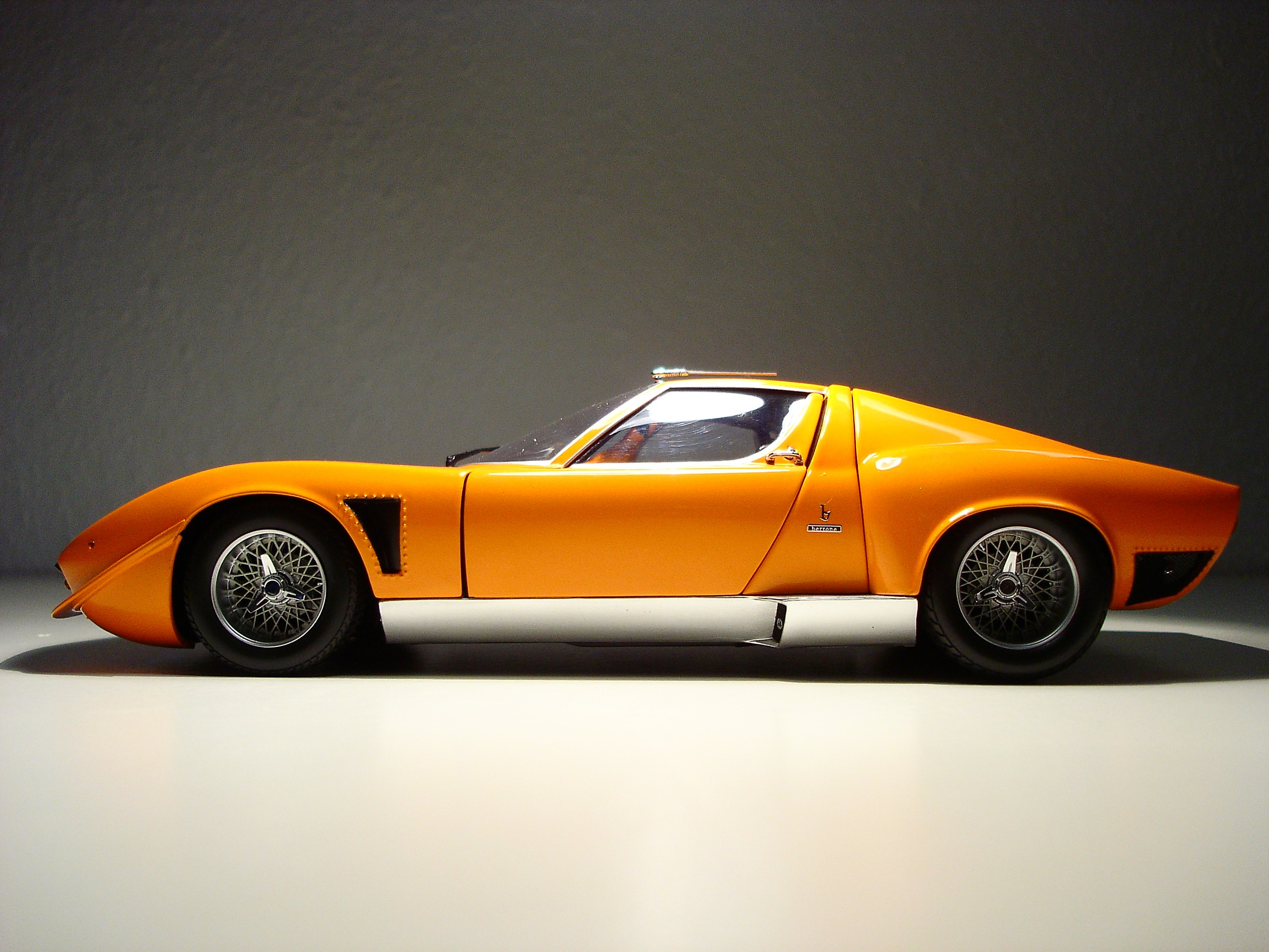 Fotos von Modellauto Lamborghini Jota 1:18 Kyosho